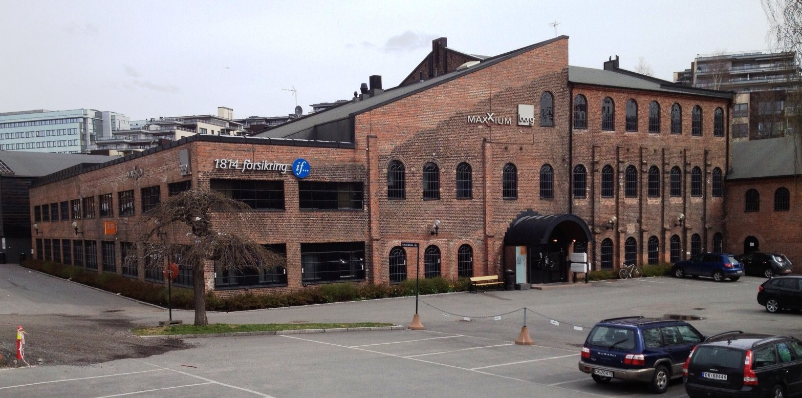 Bjørsheim, Nydalen. Opprinnelig bygget om tekstilfabrikk i 1857. Anlegget ble ombygget etter brann i 1890. Spikerverket overtok i 1897, og tok det i bruk til trådstiftproduksjon. Det ble produsert stift her helt til 1988. Da ble det gjort om til kontorer.